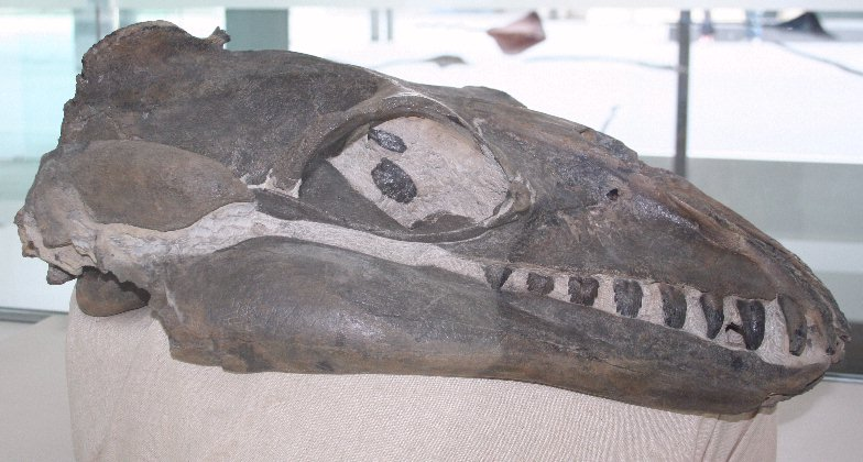 Janjucetus skull Melbourne Museum Photo:Cas Liber